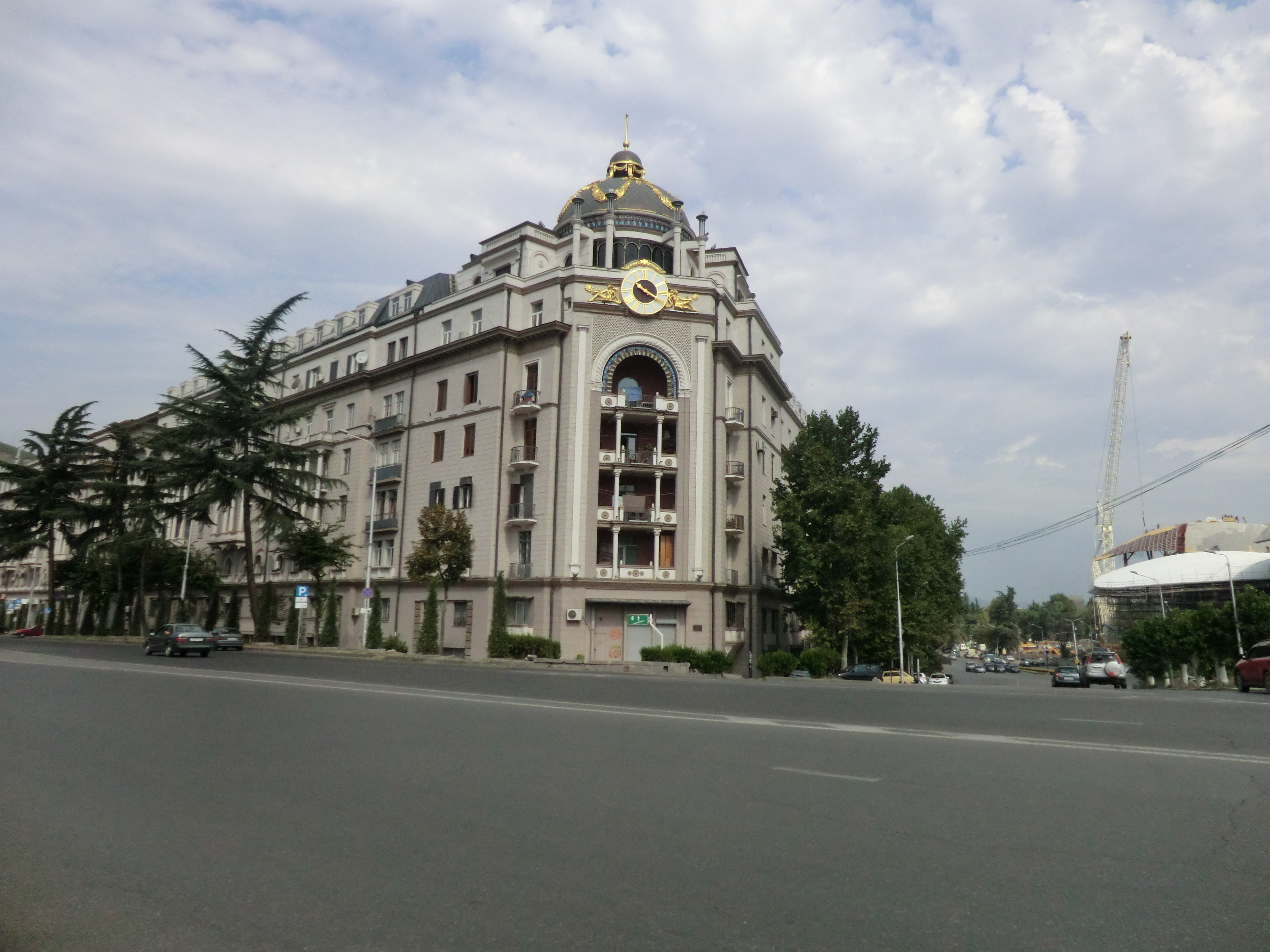 Dzveli Tbilisi, Tbilisi, Georgia